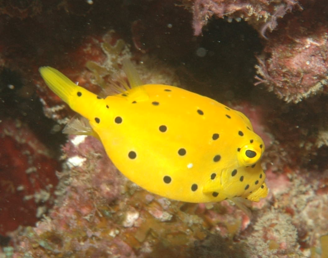 Ostracion cubicus (juvenile)Great Barrier Reef, Cairns, Australia